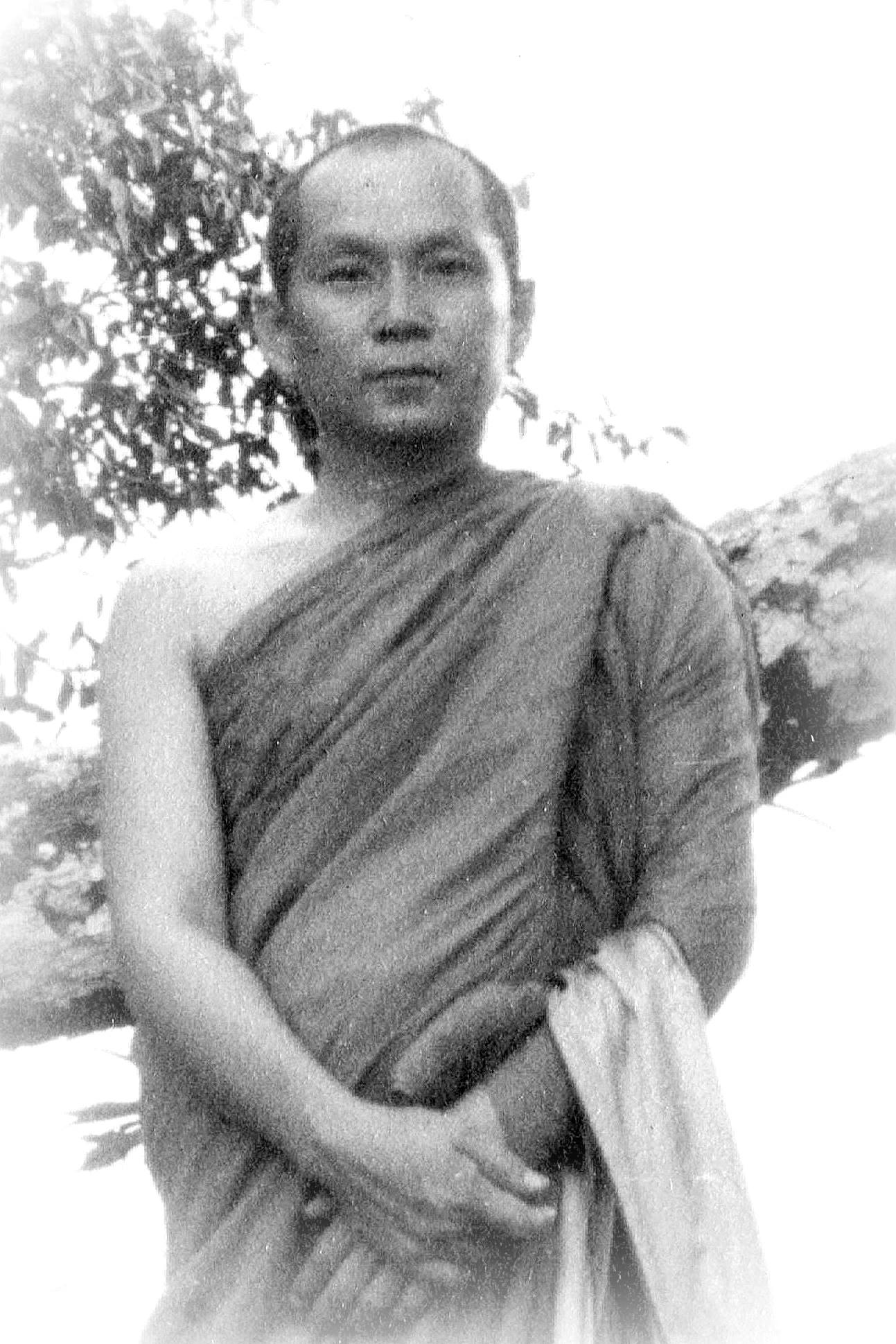 พระมหาอัมพร อัมพโร (สมณศักดิ์ปัจจุบันคือสมเด็จพระอริยวงศาคตญาณ สมเด็จพระสังฆราชองค์ที่ 20 ของประเทศไทย) บันทึกภาพที่วัดถ้ำขาม จังหวัดสกลนคร เมื่อ เดือนเมษายน พ.ศ. 2508 โดย หม่อมหลวงชัยนิมิตร นวรัตน ภาพดังกล่าวนี้เจ้าของภาพอนุญาตให้เผยแพร่ทั่วไปได้ ดังปรากฎข้อความในสถานะเว็บไซต์เฟซบุ๊ค "ม.ล. ชัยนิมิตร นวรัตน" วันที่ 8 กุมภาพันธ์ พ.ศ. 2560 ดังนี้ "ภาพประวัติศาสตร์ผมถ่ายเองเมื่ออายุ ๑๖ ลิขสิทธิ์มี แต่สำหรับผู้ที่ศรัทธานับถือสมเด็จพระสังฆราชอัมพรมหาเถระ สามารถนำไปเผยแพร่ต่อได้เลยครับไม่จำเป็นต้องขอ แต่ใครเอาไปใช้แล้ว โปรดอย่าไปอ้างตนเป็นเจ้าเข้าเจ้าของเสียเองก็แล้วกัน"